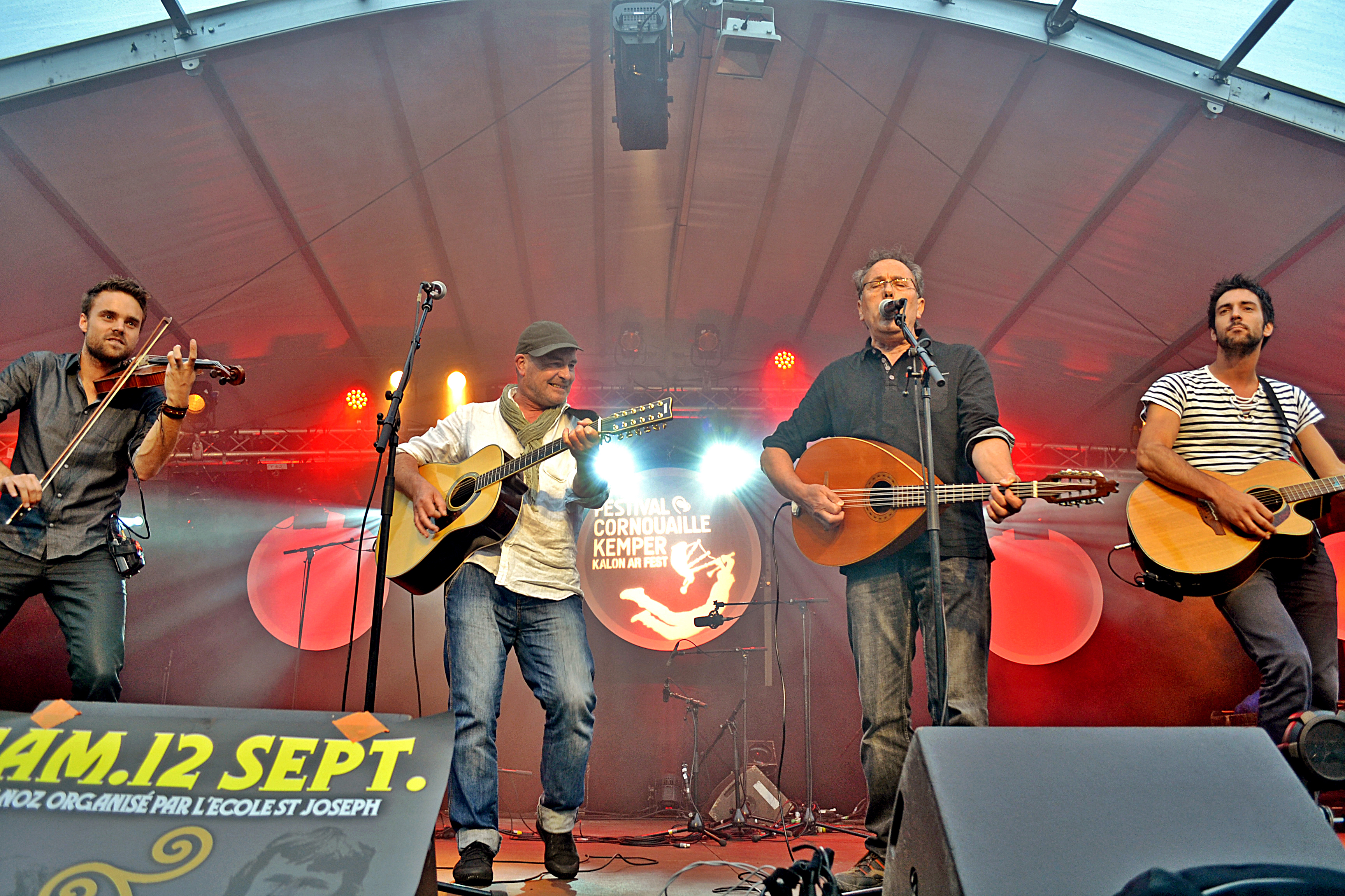 Outside Duo accompagné des artistes s'étant produits dans la semaine, Jean-Pierre Riou (The Celtic Social Club) et Farid Aït Siameur (Taÿfa) au festival de Cornouaille à Quimper le 26 juillet 2015.